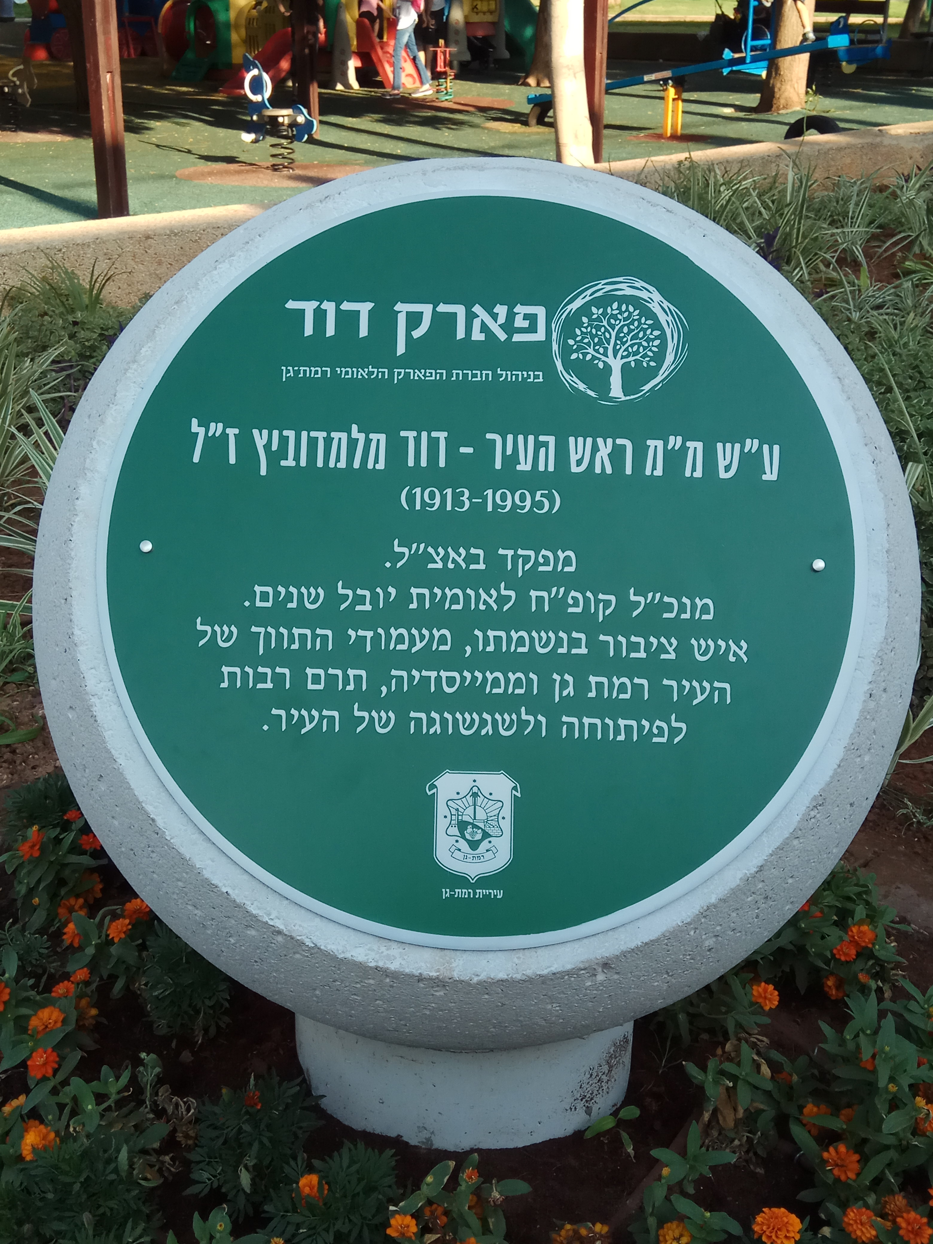 שלט זיכרון לדוד מלמדוביץ בפארק דוד במרום נווה